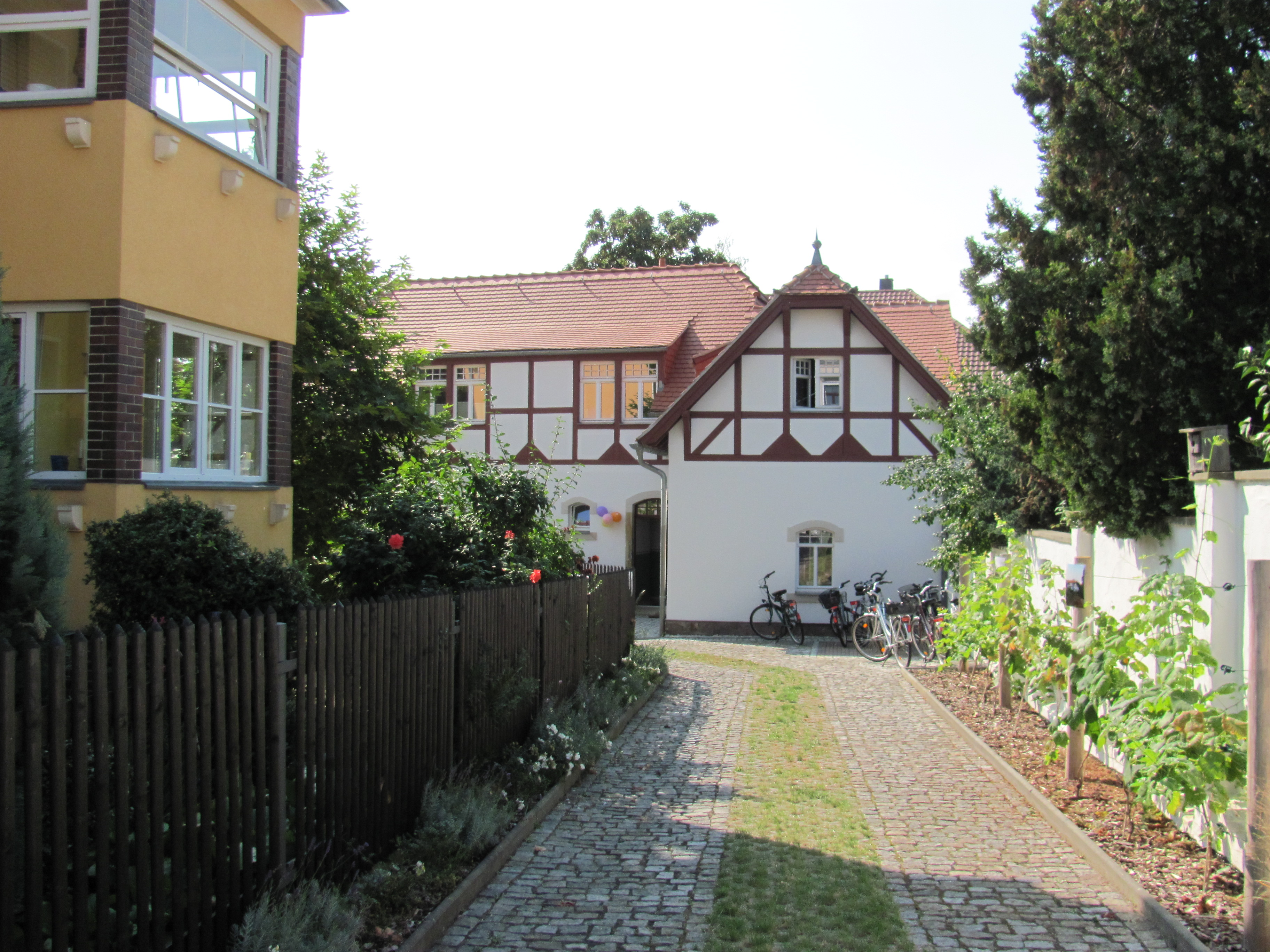 Radebeul Remisengebäude Heinrich-Heine-Straße 11a